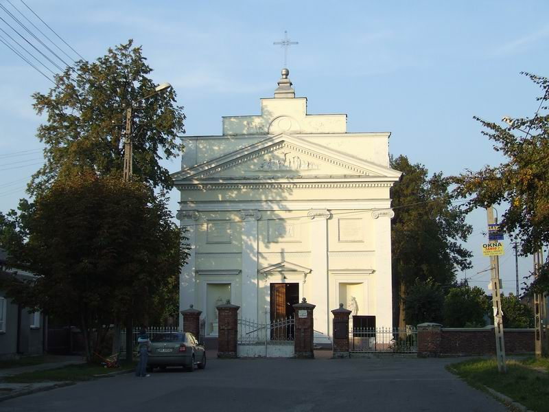 Kościół parafialny p.w. św. Stanisława Kostki w Okuniewie 1823-1835 (zabytek nr rejestr. 1070/148)